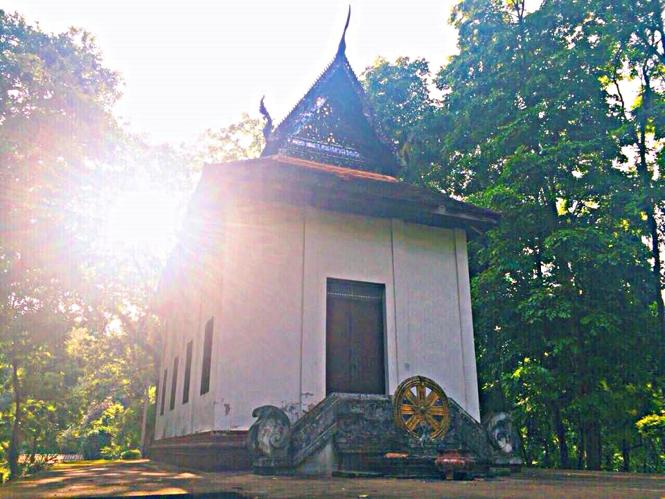 อุโบสถวัดป่าแดง